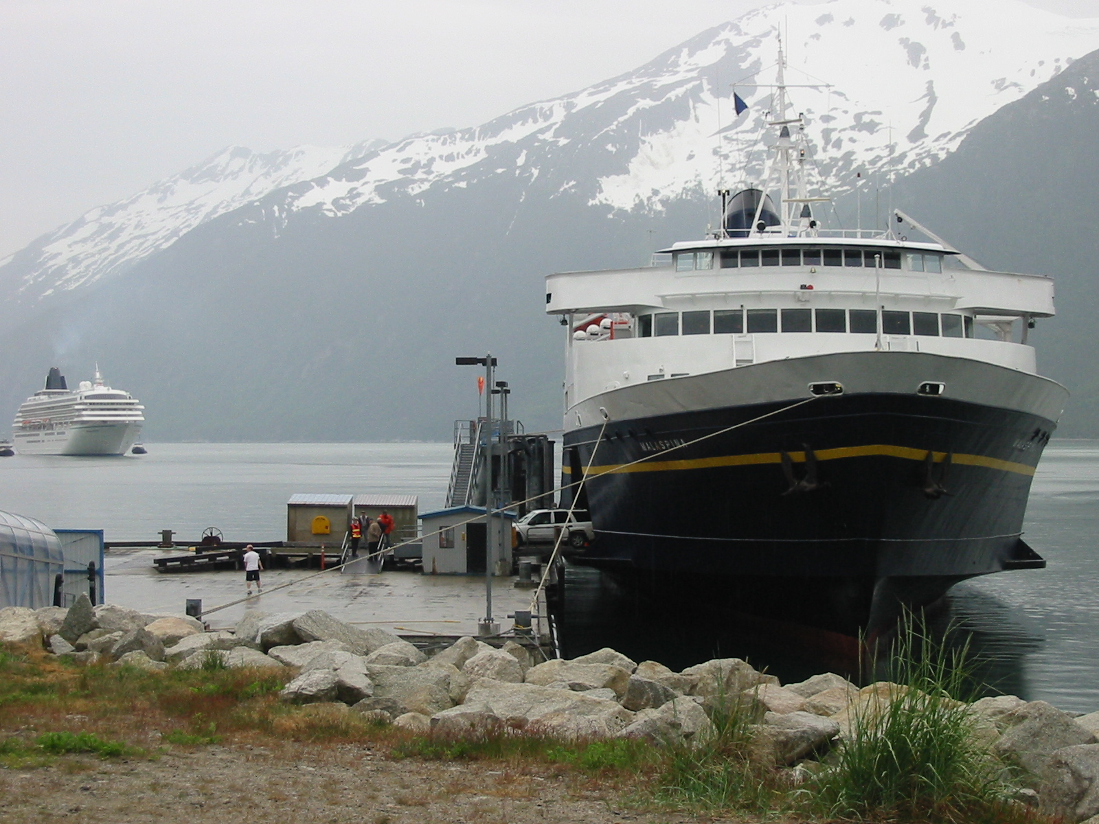 M/V Malaspina at port in Skagway.